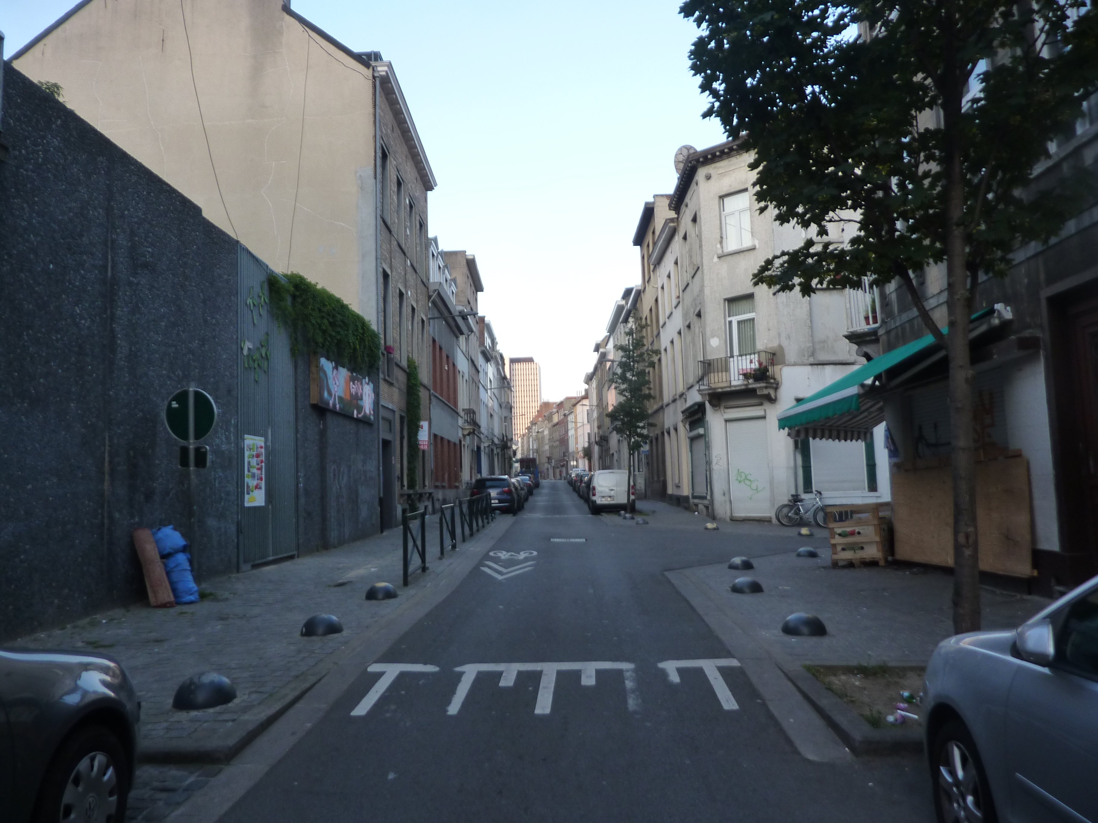 Rue Verte à Bruxelles, Belgique.